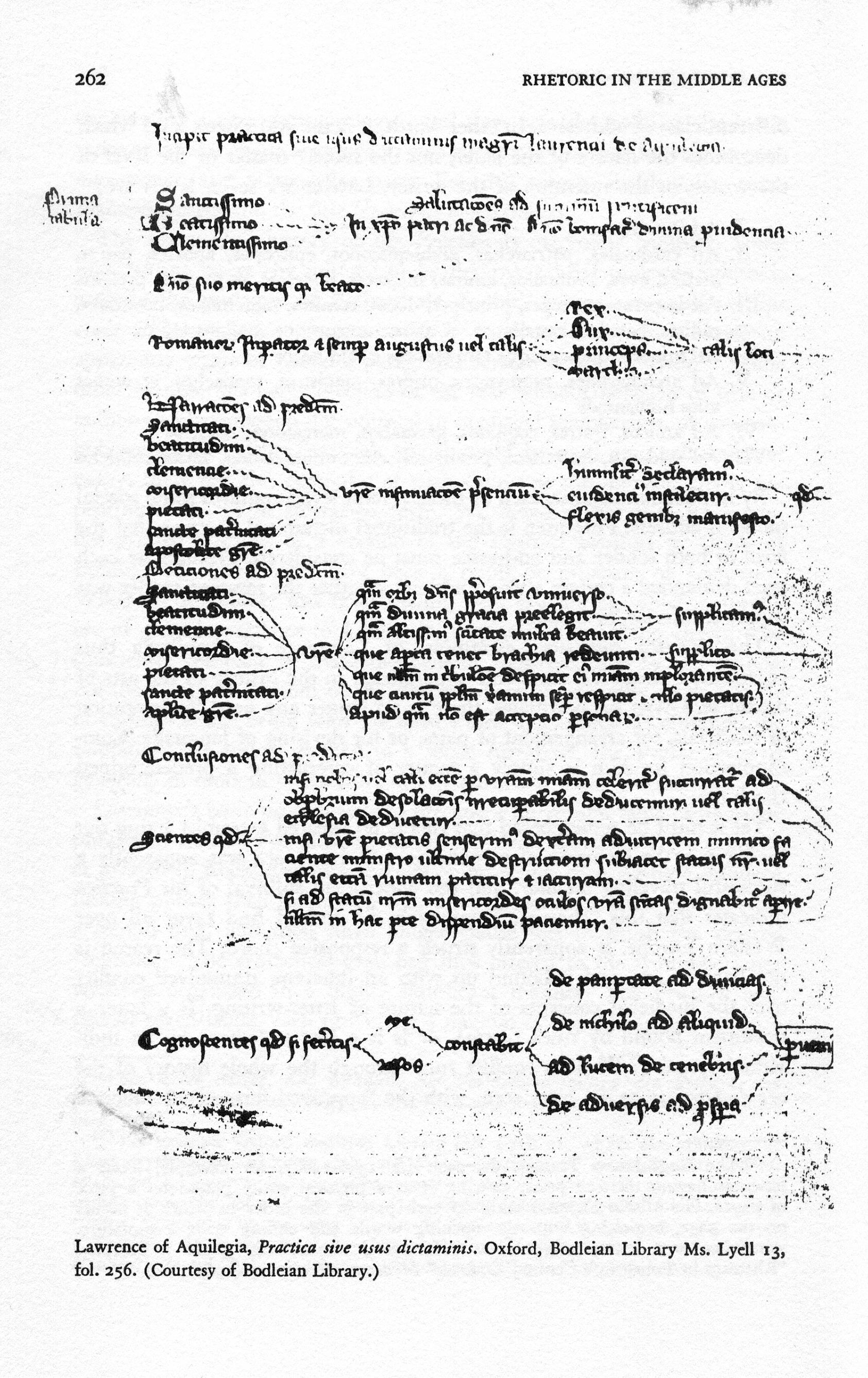 Practica sive usus dictaminis